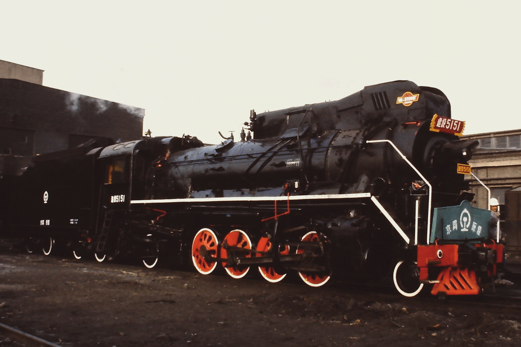 CNR JS-5151 (Xi'ang)